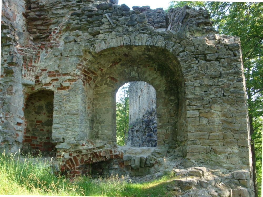 Konvendihoone varemed.